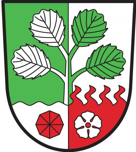 Horní Olešnice, znak obce